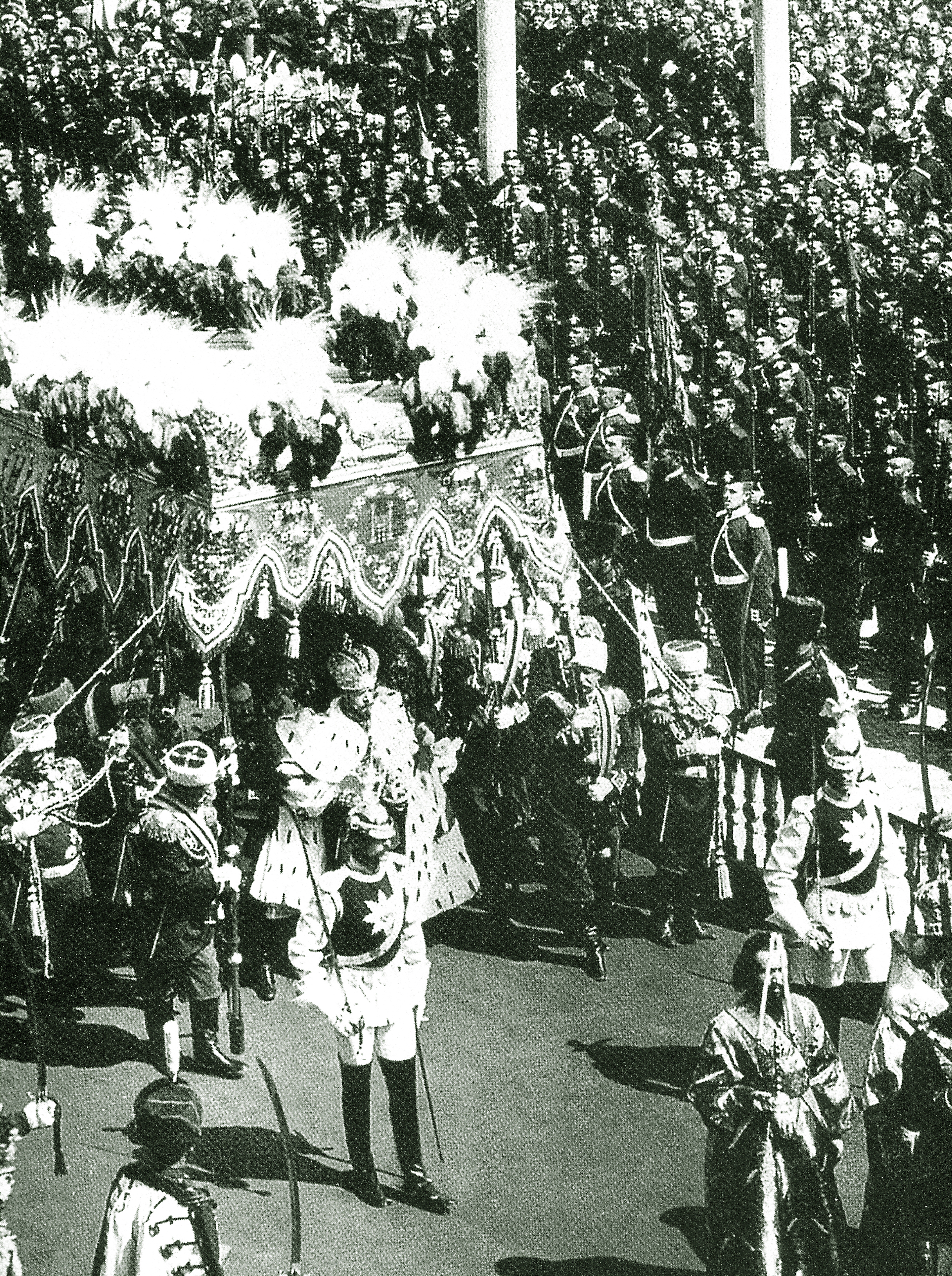 Коронация Николая Второго. В почётном карауле от Лейб-гвардии Кавалергардского полка идут два самых рослых кавалергарда — фон Кнорринг (слева) и Маннергейм (четвёртый справа от Государя)